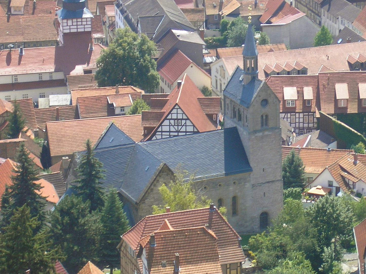 Die Stadtkirche in Treffurt (Thüringen) von der Burg Normannstein aus betrachtet.